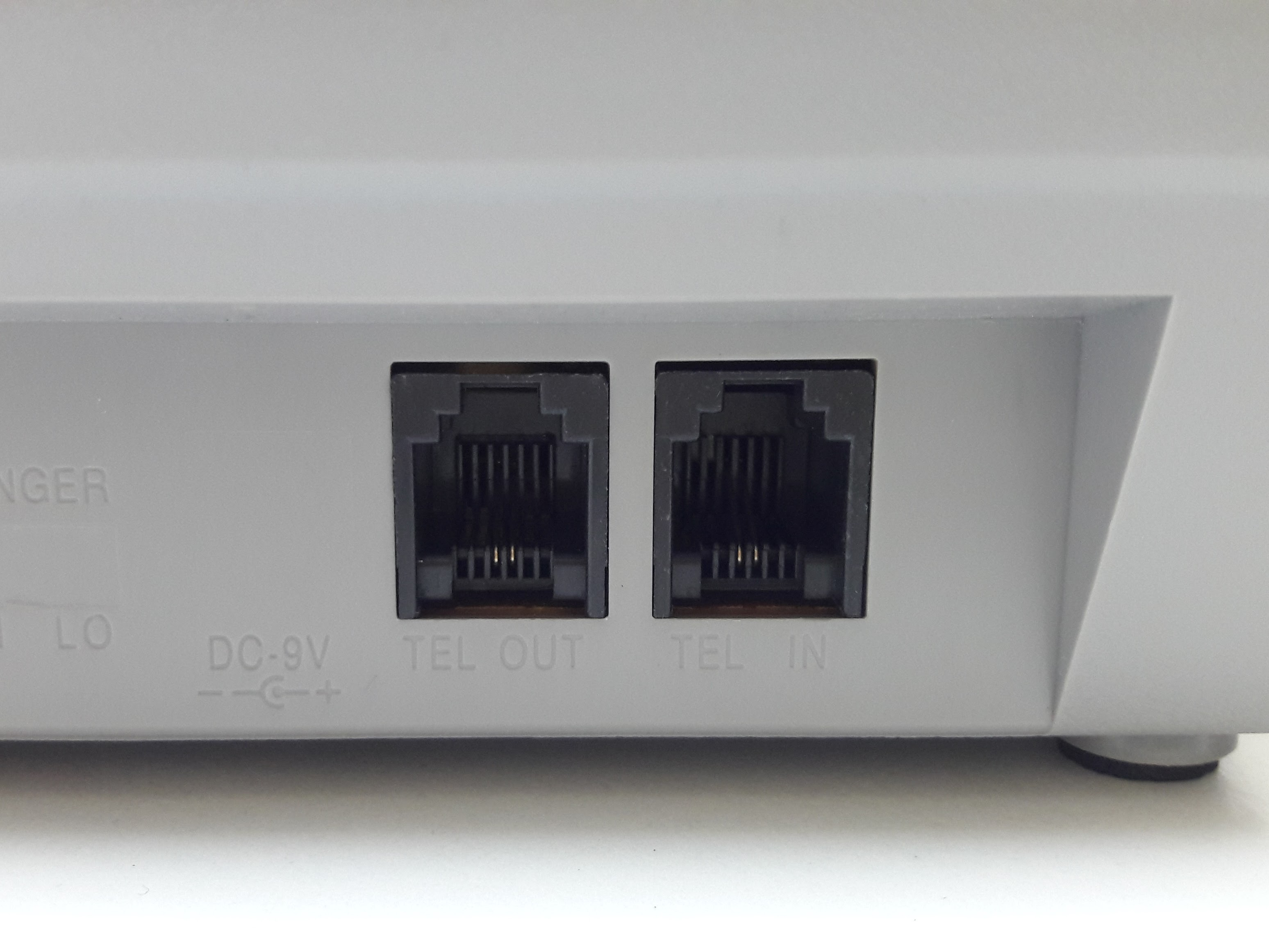 中文（中国大陆）: 东讯类比电话机AP3303的FXO连结埠位(右侧)，用途为插上电信业者之线路(使用RJ-11介面)